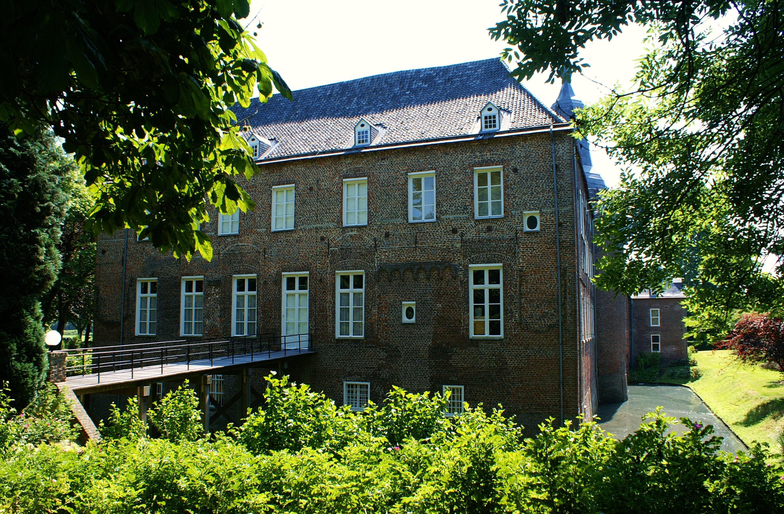 De achterzijde van slot Well te Well met de brug over de gracht naar de tuin.